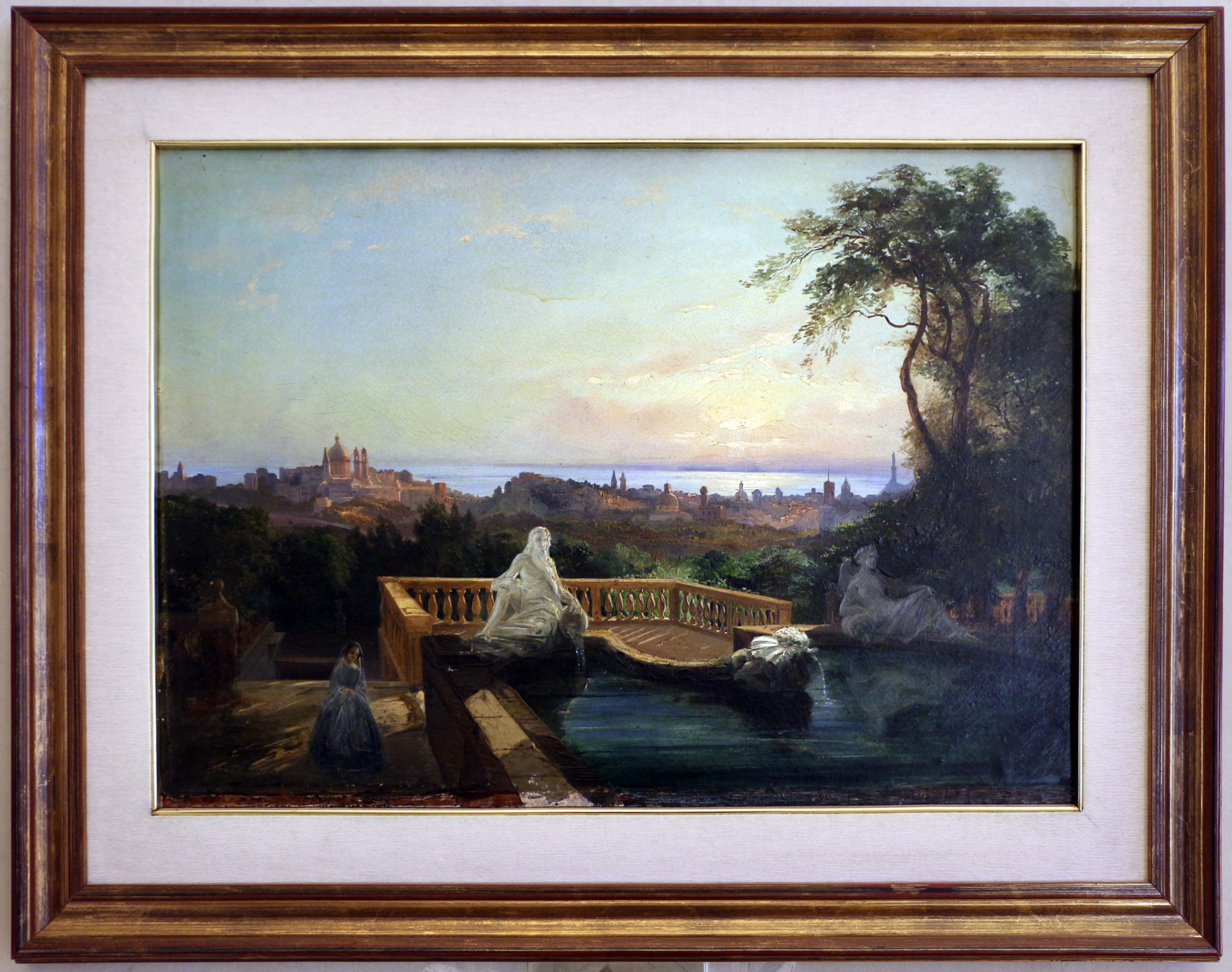 Il parco e i musei di Nervi This is a photo of a monument which is part of cultural heritage of Italy.